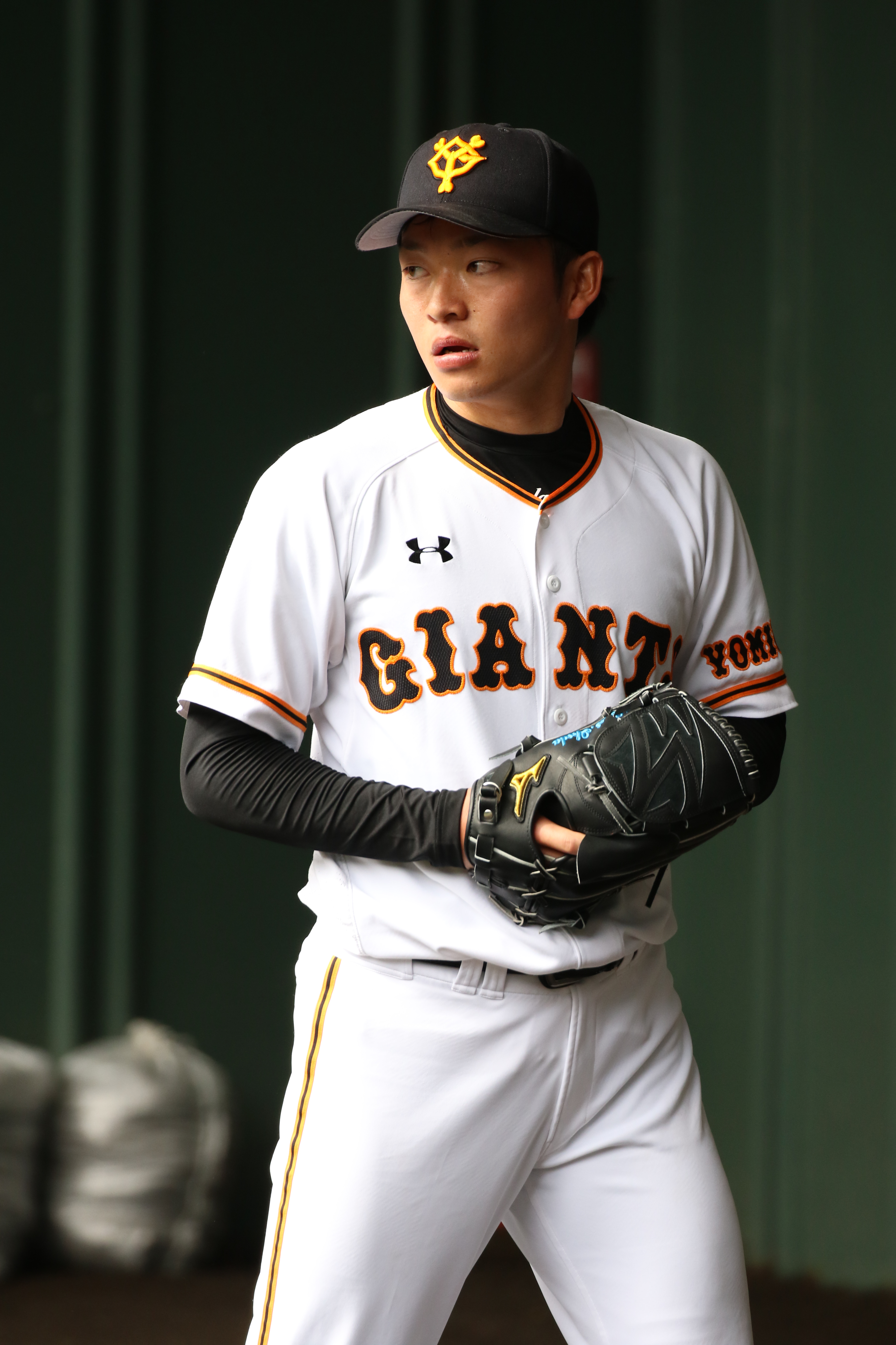 ジャイアンツ池田選手